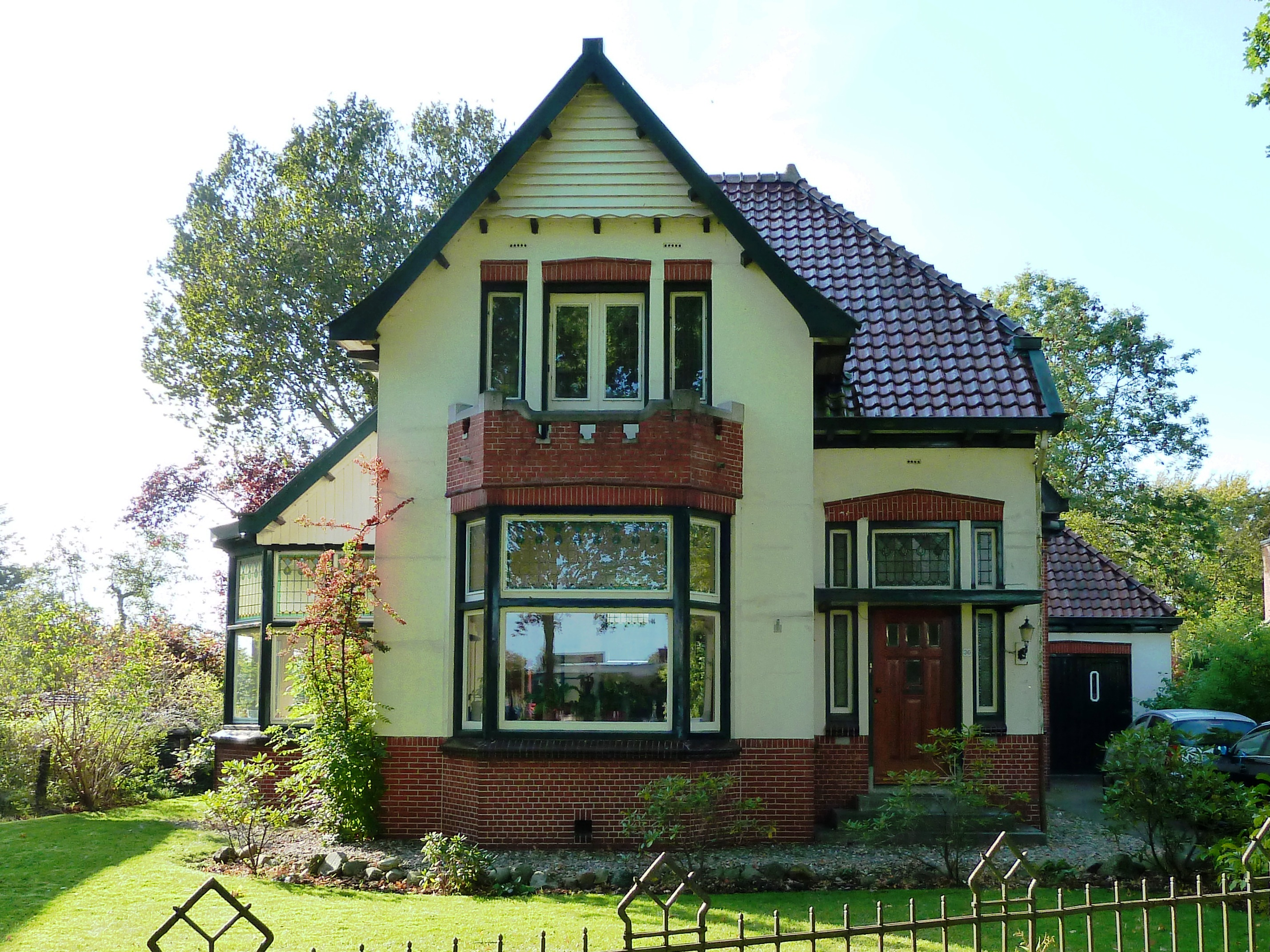 Woonhuis met aangebouwd koetshuis aan De Gast 36 in Zuidhorn uit 1922 in overgangstijl met Chaletstijl-elementen naar een ontwerp van Klaas Siekman. Fraai ensemble met het huis op nummer 34.